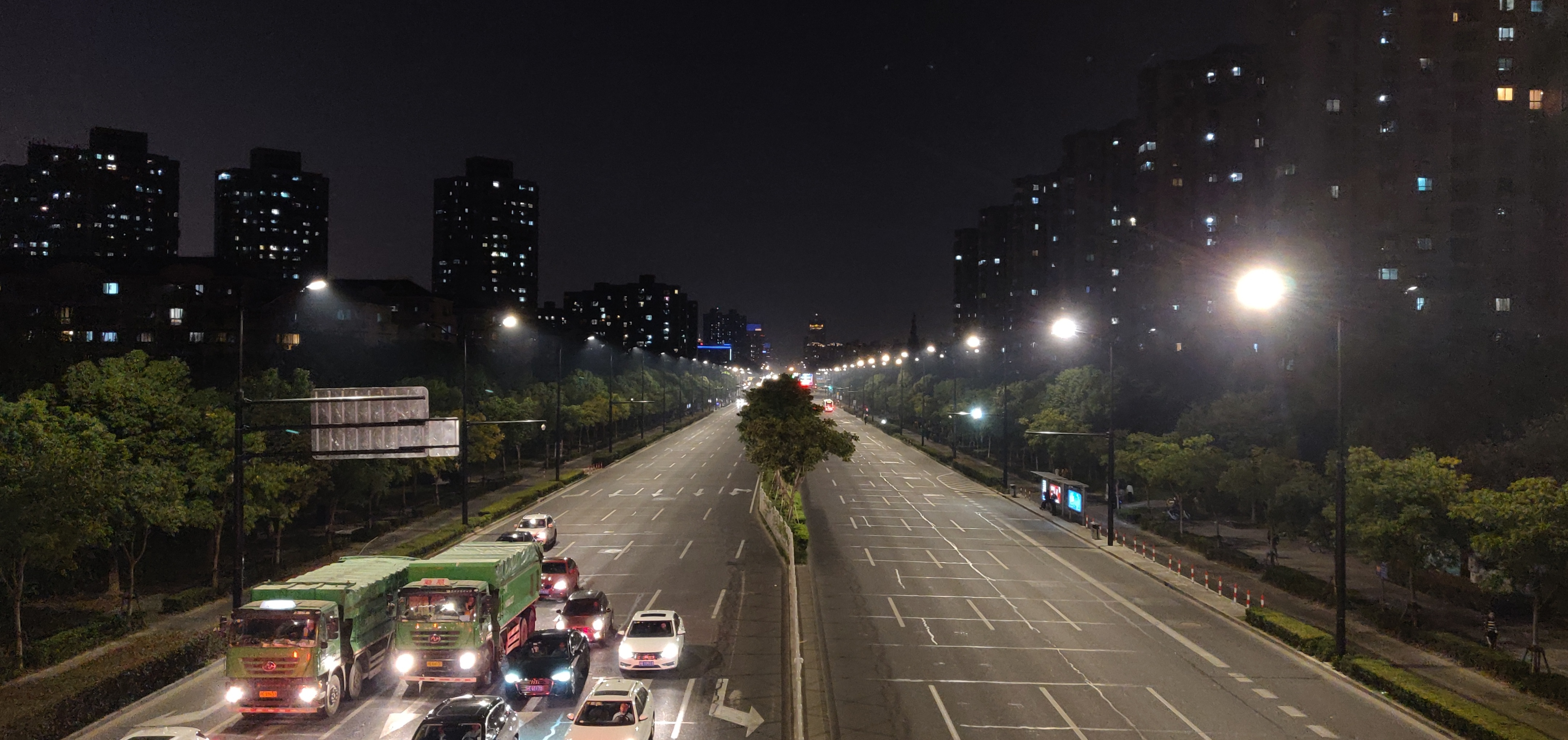 中文（中国大陆）: 从浦三路跨杨高南路过街天桥向西北方向看杨高南路。